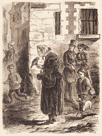 Portrait de la femme au perroquet, Parisienne née Maillard, décédée en octobre 1868, célébrité du Quartier latin. Illustration d'un article sur elle, publié dans Le Monde Illustré et signé L. de B.